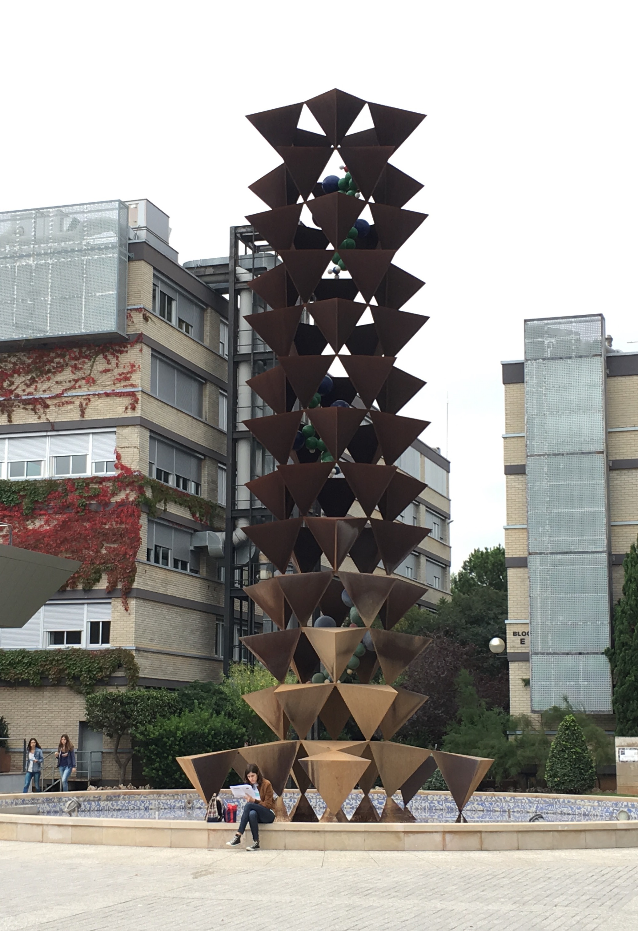 Escultura de la fuente